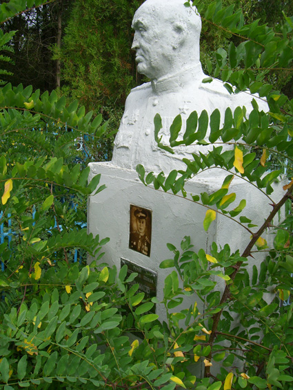 Памятник на могиле Героя Советского Союза Фёдора Борисовича Бубликова на Центральном кладбище в Грозном